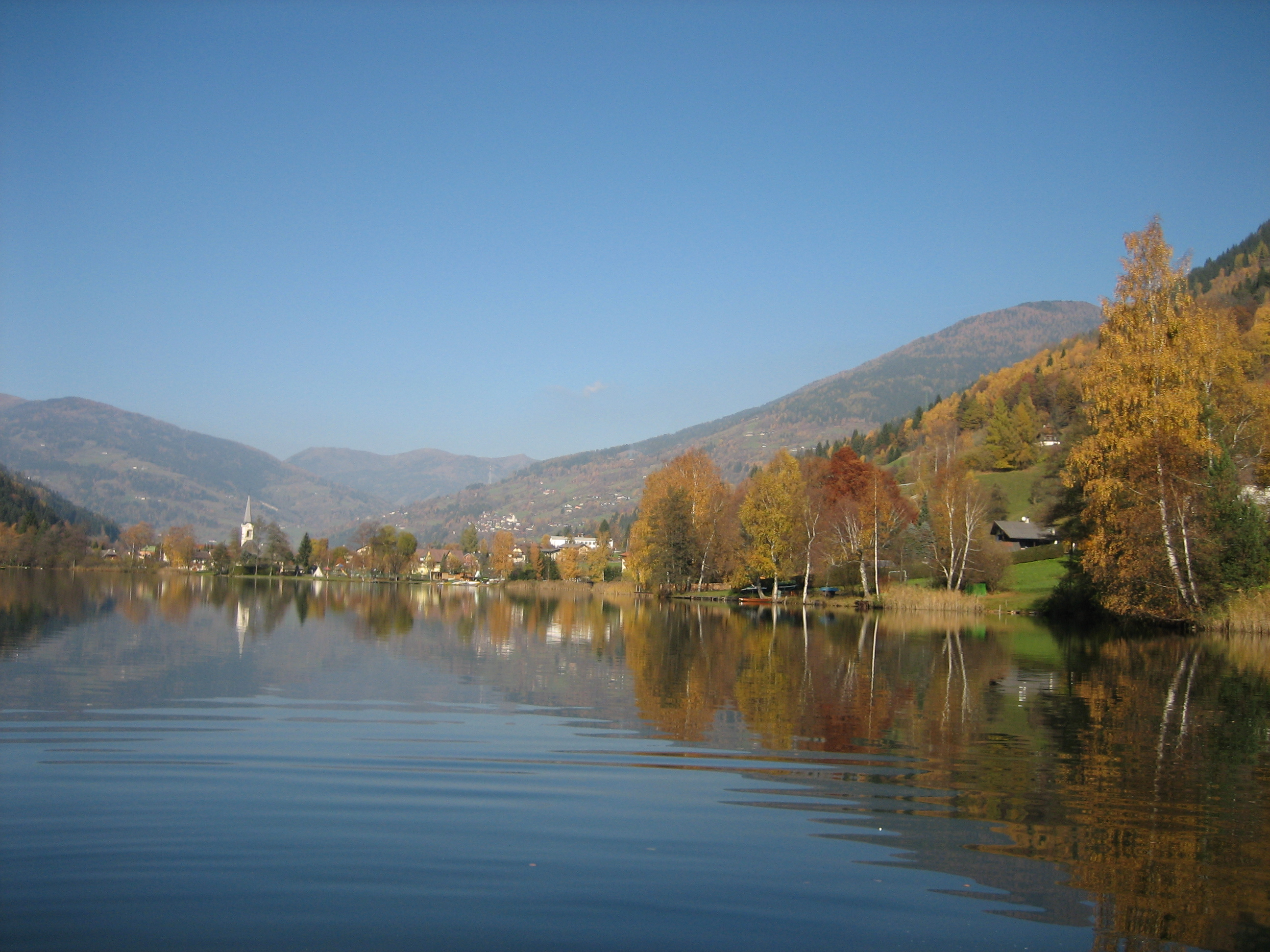 Description: Feld am See / Carinthia / Austria - St. Peter ob Radenthein am Fuße des Priedröf (Hintergrund, Mitte, rechts), Laufenberg (Hintergrund, Mitte, links), Schwarzwald / Langnock / Rosennock (ganz hinten) Source: Own Photo, October 2005 Photographer: Philipp Steiner